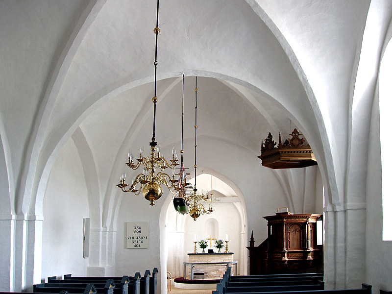 Hørning Kirke - Kirkerummet Hørning Sogn, Hjelmslev Herred, Skanderborg Amt / Århus Amt.